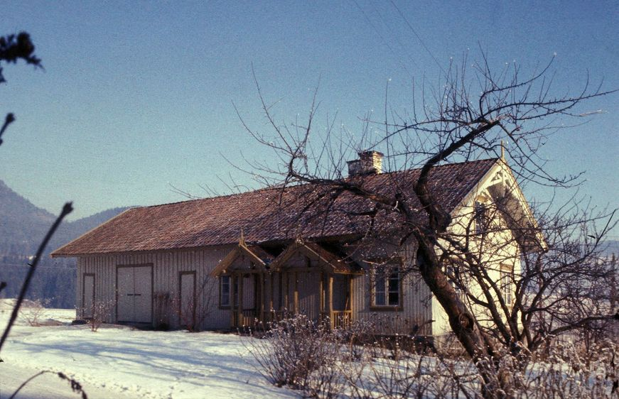 Drengestue/forpakterbolig ved Sauherad prestegård